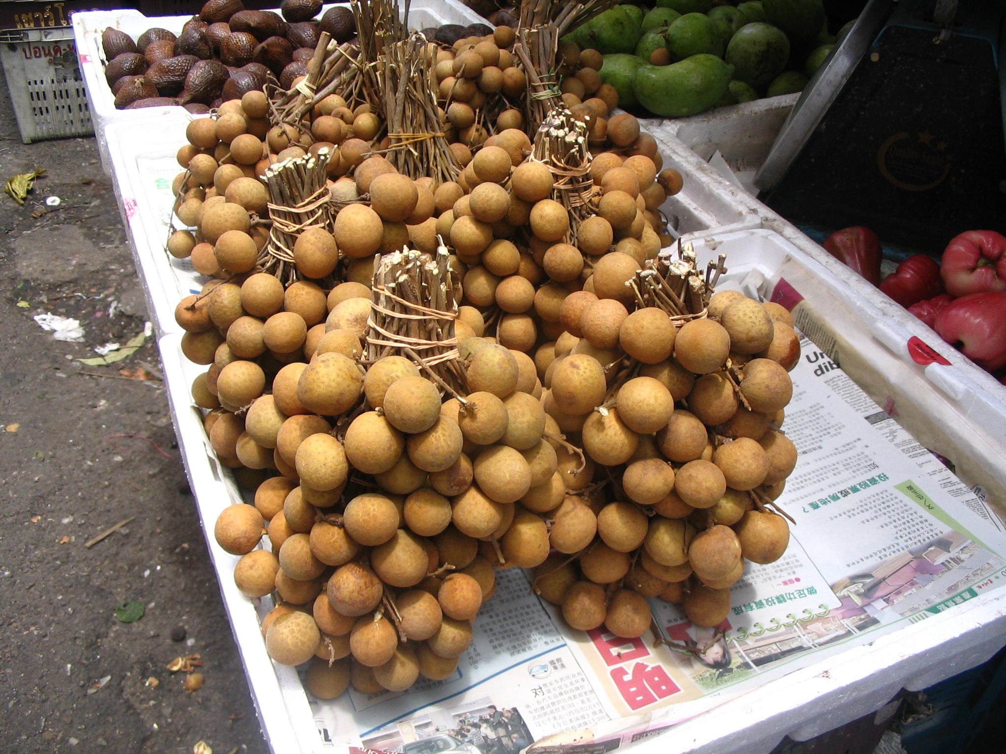 Grappe de longans Dimocarpus longan au marché de Chow Kit, Kuala Lumpur - Malaisie